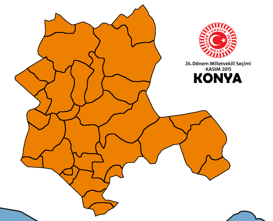 Kasım 2015 Seçimleri